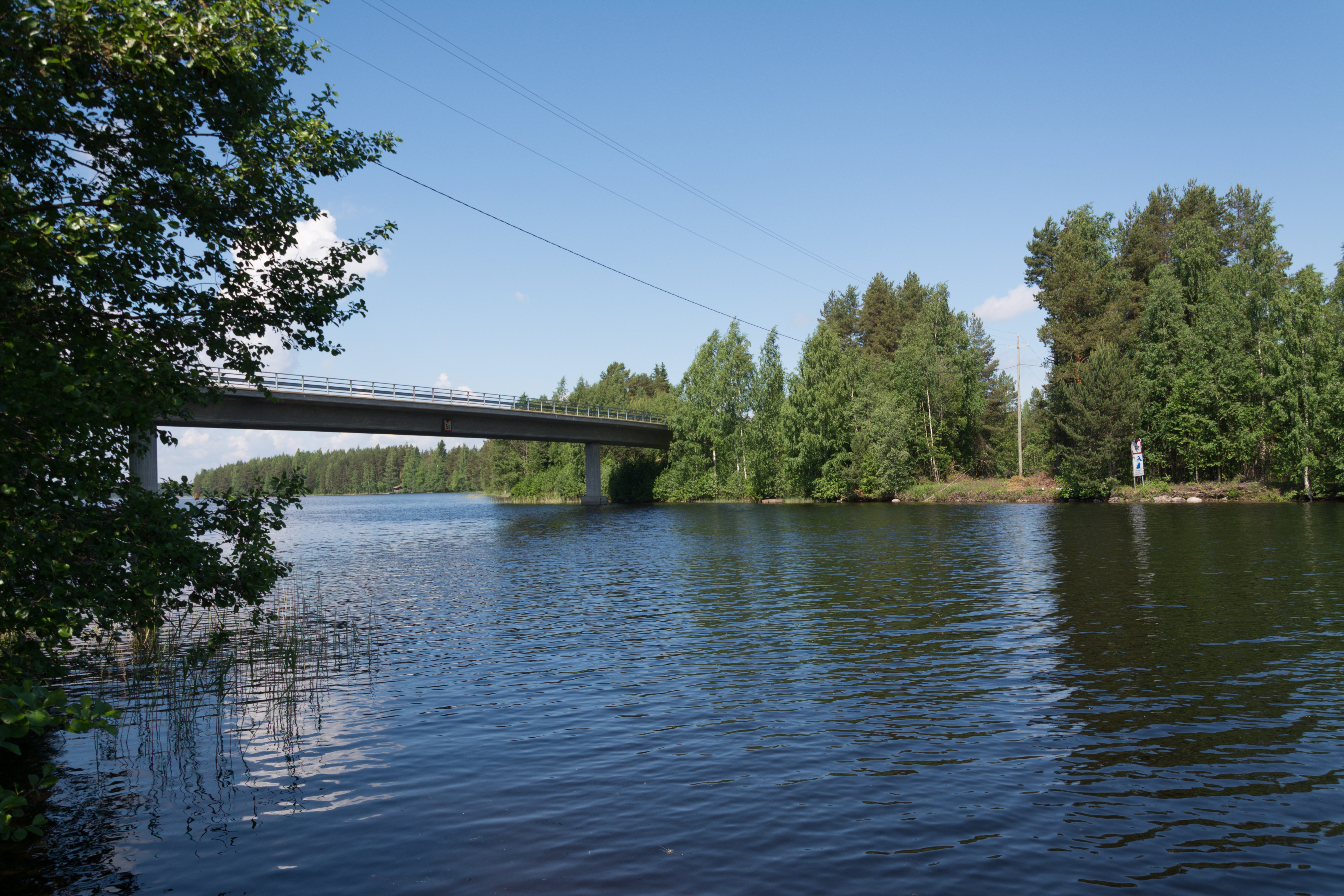 Saynätsalmen kanava